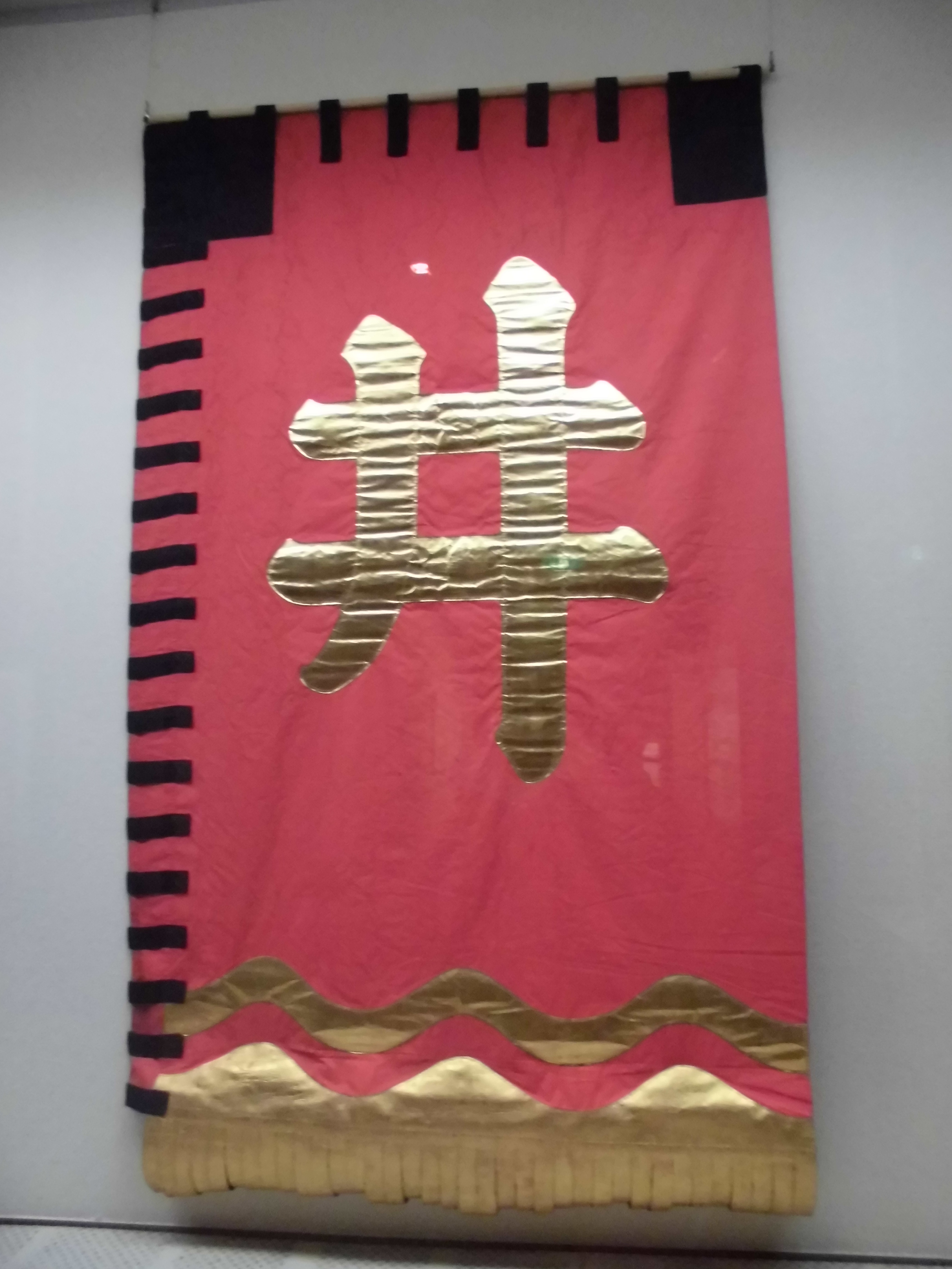 中文（香港）: 井伊氏軍旗